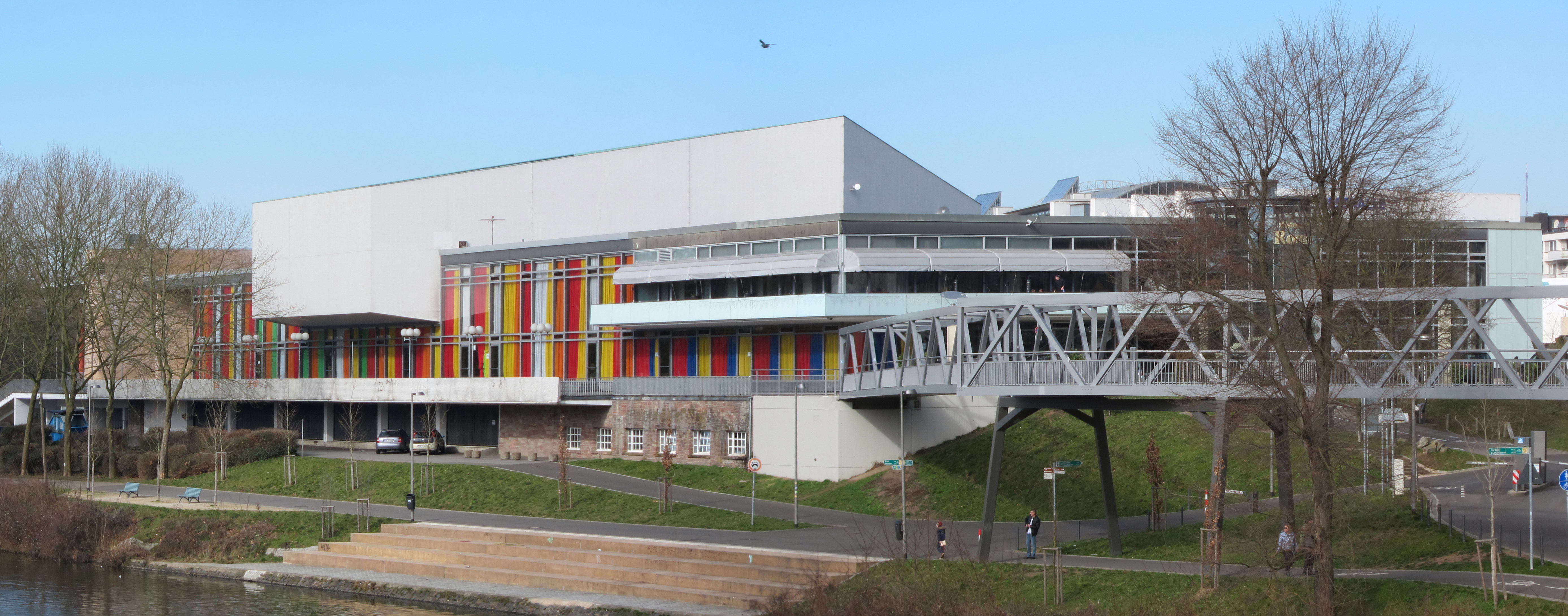 Congresshalle Saarbrücken (Ansicht von der Luisenbrücke aus)